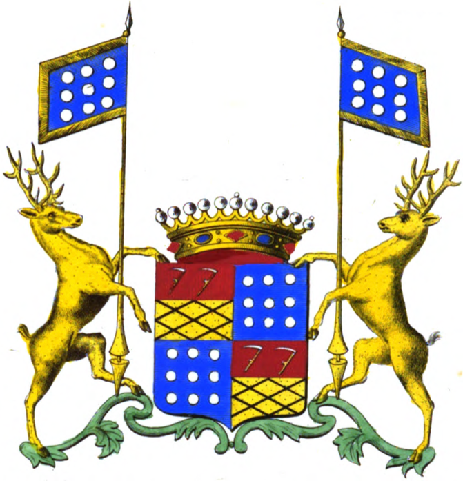 Armoiries de la famille de Jamblinne de Meux